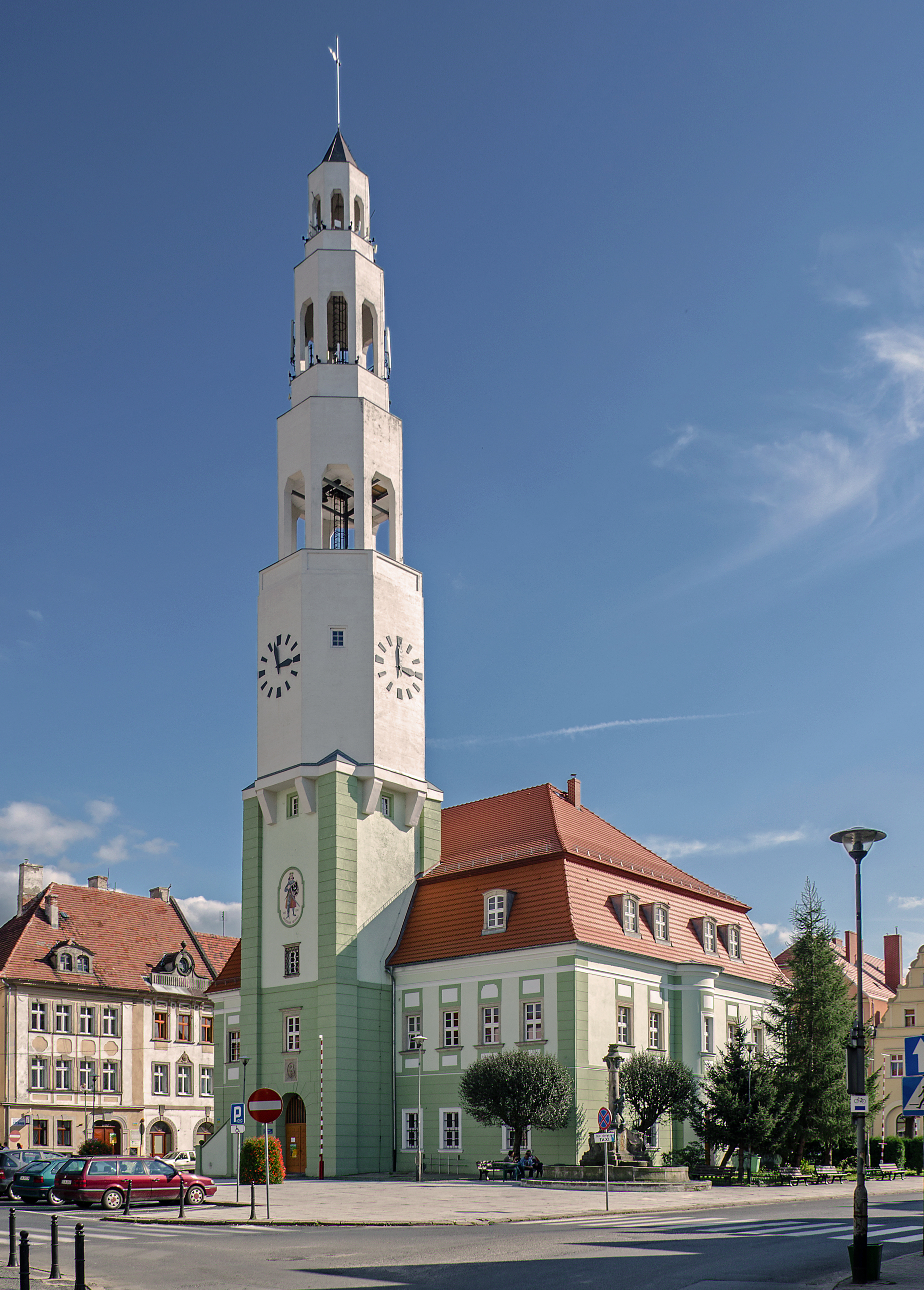 ratusz, poł. XVI, XVIII, 1930 Gryfów Śląski, Rynek 1, Gryfów Śląski